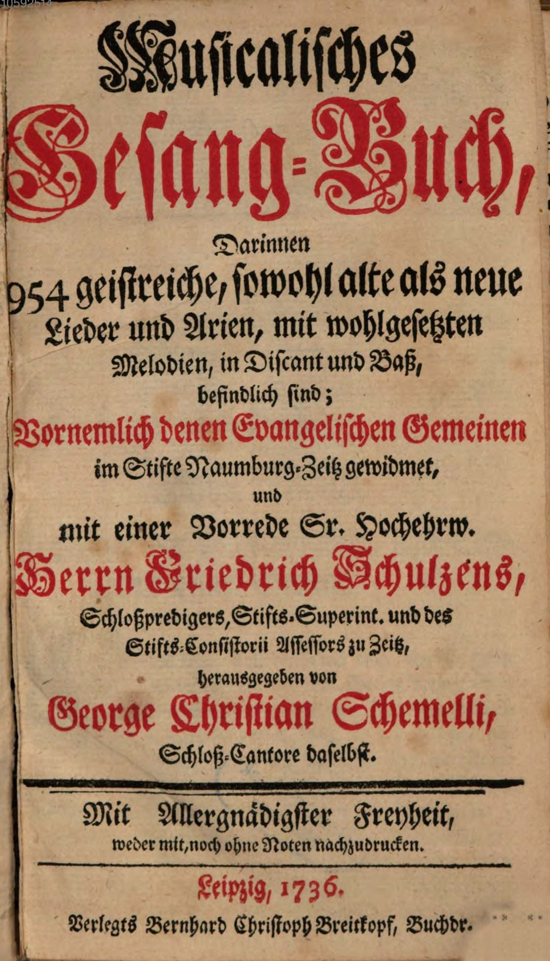 Musicalisches Gesang-Buch, hg. von Georg Christian Schemelli 1736, mit mehreren Melodien und Generalbassbegleitungen von Johann Sebastian Bach